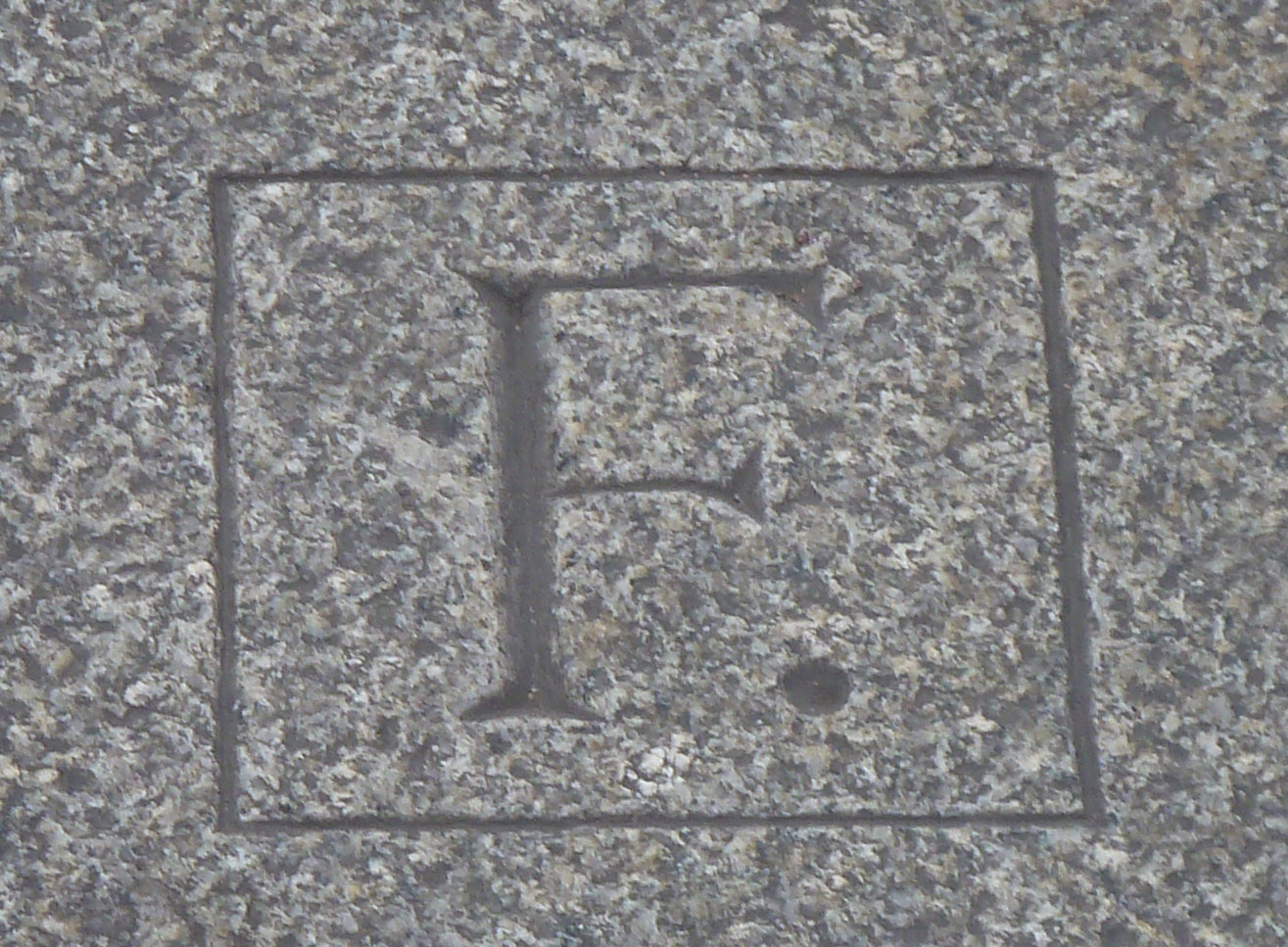 Der mit einem eingemeißelten „F.“ versehene Fetscherstein erinnert an der Prager Straße in Dresden an die Ermordung des Arztes Rainer Fetscher am 8. Mai 1945. Die Maße von 16 cm × 16 cm entsprechen denen des Napoleonsteins auf dem Schloßplatz. Der Stein befindet sich mittig auf der Straße auf Höhe des P&C-Haupteingangs.